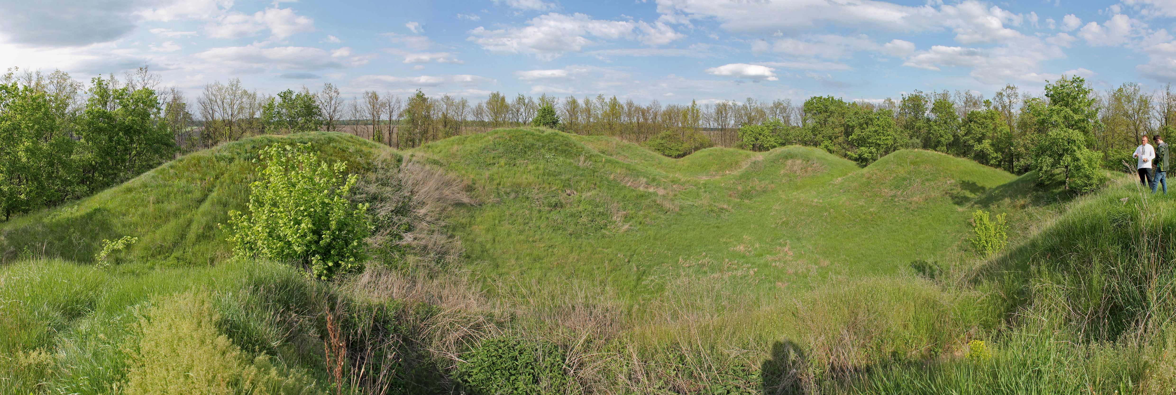 Могильник "Розрита могила" (XII-IX ст. до н.е., бондари­хинська куль­тура; VII-IV ст. до н.е., скіфський час; XIV - XVII століття), біля с.Лихачівка, лівий берег р.Ворскла, автотраса смт.Опішня –Котельва – Колонтаїв.